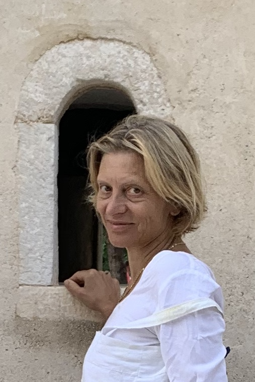 Tamara Djermanovic Tanasijevic